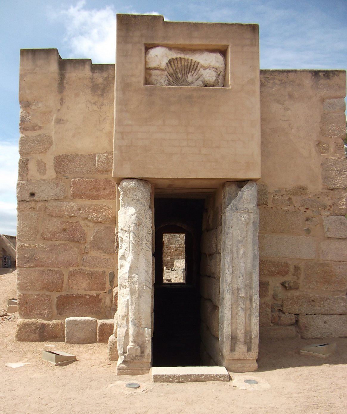 Entrada al Aljibe subterráneo de la Alcazaba de Mérida. En su parte superior se construyó una Mezquita de la que se conserva una de las plantas.